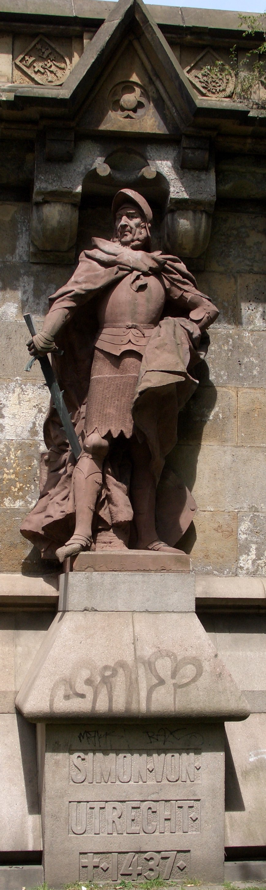 Simon von Utrecht am Sockel der Brücke Seewartenstrasse in Hamburg (Landungsbrücken).